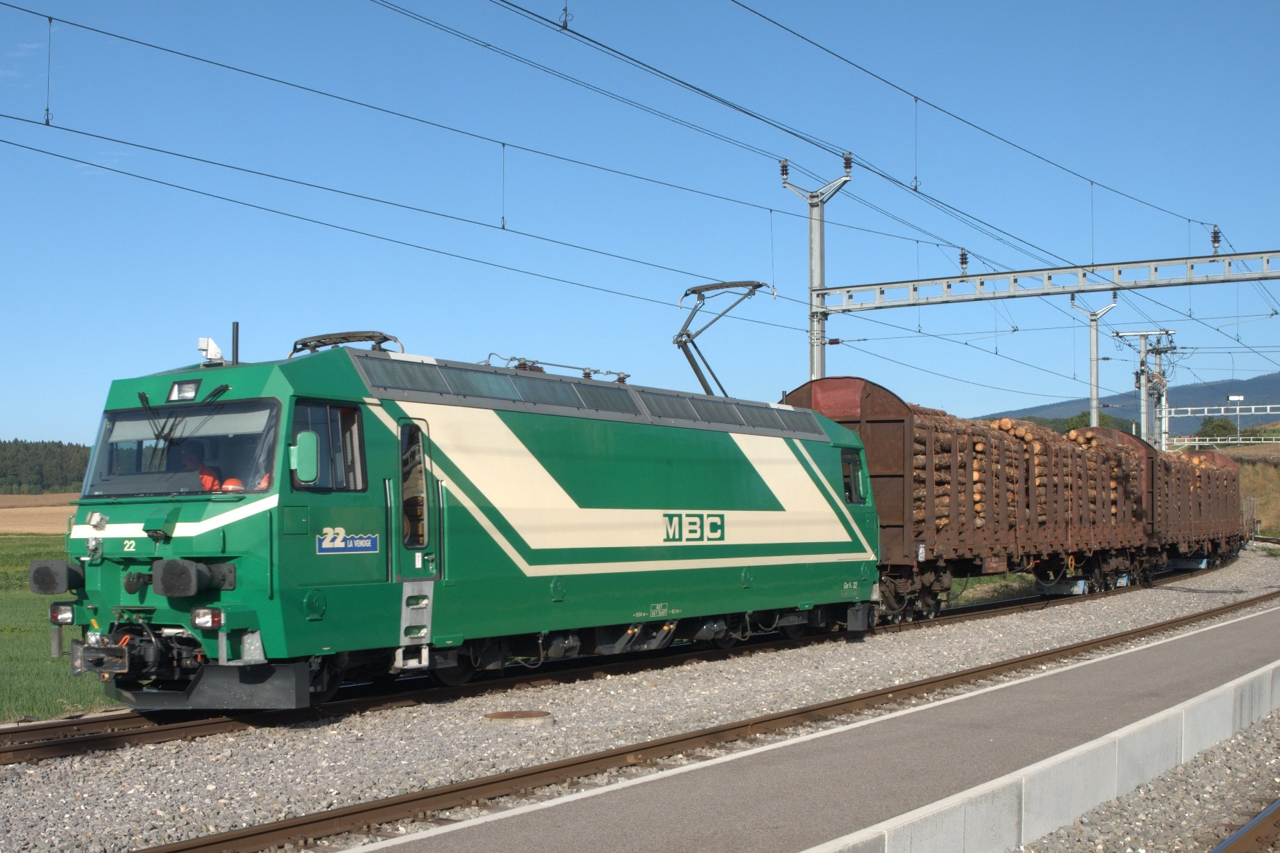 Meterspur-Lokomotive für hochgespannten Wechselstrom Ge 4/4 22 La Venoge mit einem Güterzug auf der Bahnstrecke Bière–Apples–Morges in der Westschweiz in Apples. Der Lokomotive folgen zwei vierachsige mit Holz beladende Güterwagen auf Rollböcken. Die Güterwagen sind unter sich wie auch mit der Lokomotive mit der Schraubenkupplung verbunden. Die Lokomotive mit den markanten Puffertellern der ehemaligen Bière–Apples–Morges-Bahn (BAM), heute Transports de la région Morges Bière Cossonay (MBC), ist weitgehend baugleich mit den RhB Ge 4/4 III 641 bis 652 der Rhätischen Bahn (RhB) und den Ge 4/4 8001 bis 8004 der Montreux-Berner Oberland-Bahn (MOB). Die Transports de la région Morges Bière Cossonay besitzt zwei solche Lokomotiven. Die Ge 4/4 21 und 22.